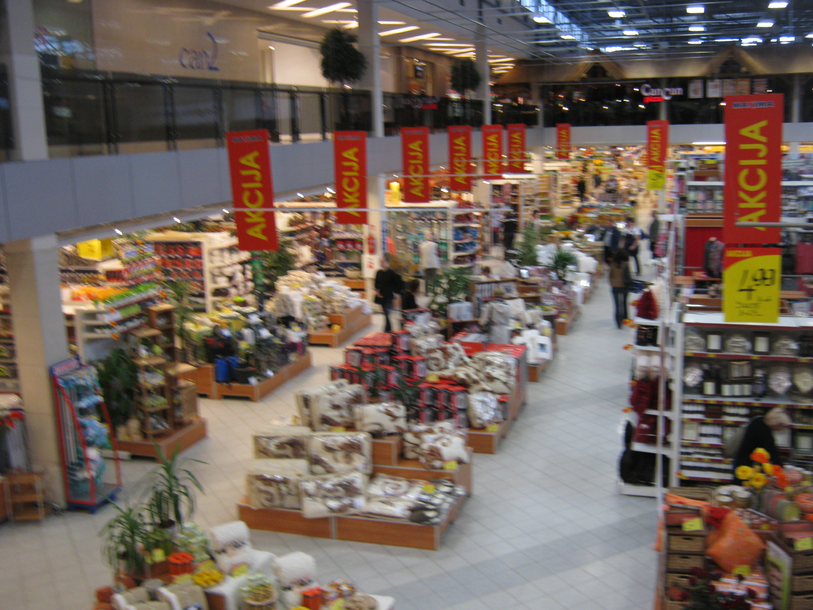 Maxima